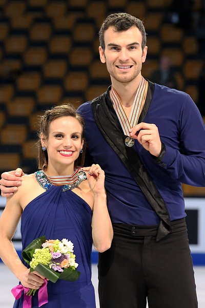 Меган Дюамель и Эрик Рэдфорд на церемонии награждения чемпионата мира по фигурному катанию 2016 в Бостоне